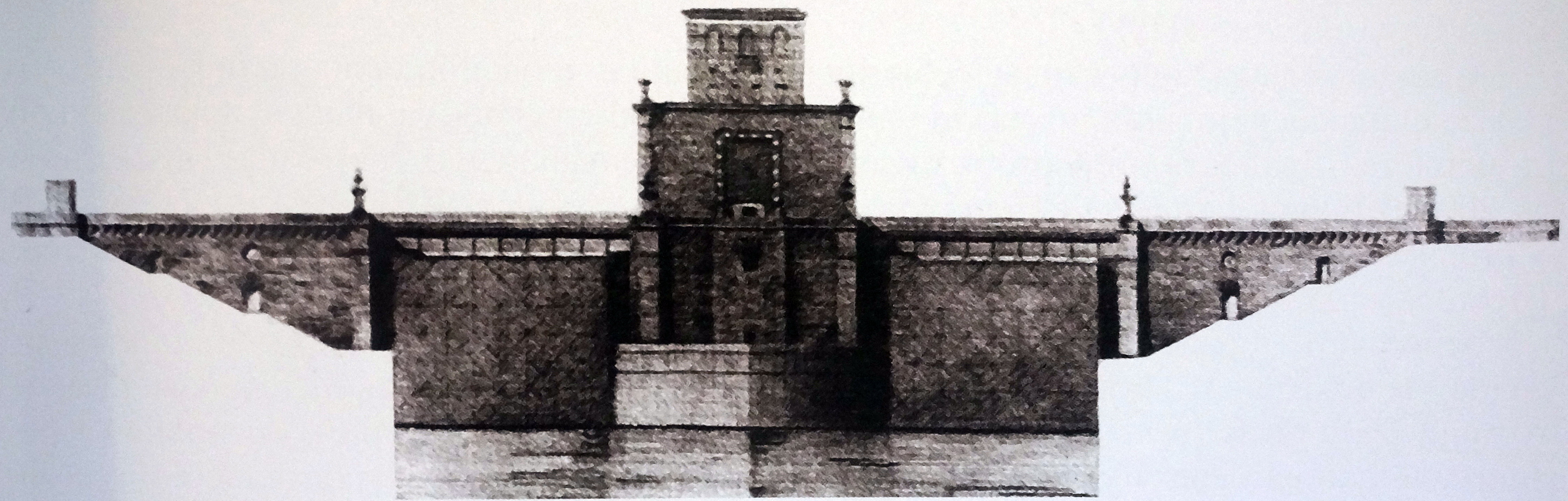 Здание управления на нижней голове шлюза. Ранний проект Жигулёвского гидроузла